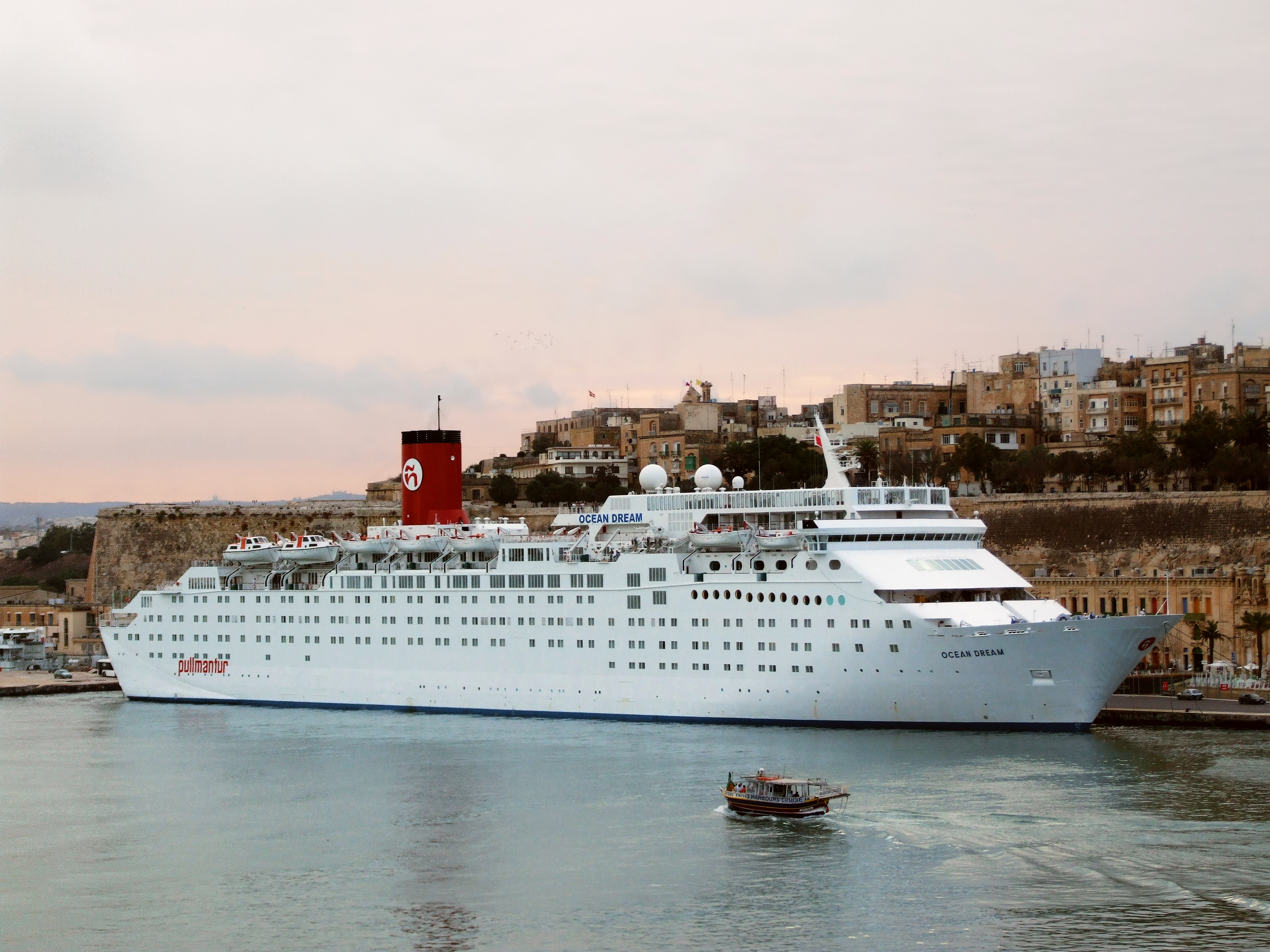 Ocean Dream im Grand Harbour, Valletta (Malta) IMO Number: 7915096 MMSI Number: 256666000 Callsign: 9HZY8 Length: 205 m Beam: 26 m